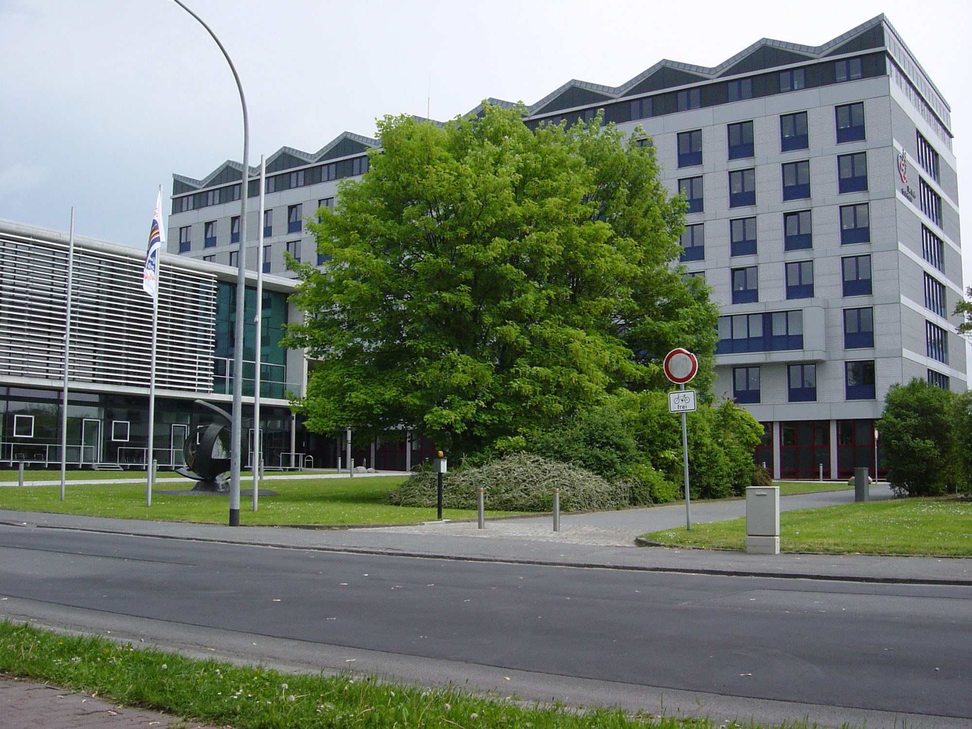 Landratsamt Groß-Gerau, Wilhelm-Seipp-Straße 4, 64521 Groß-Gerau